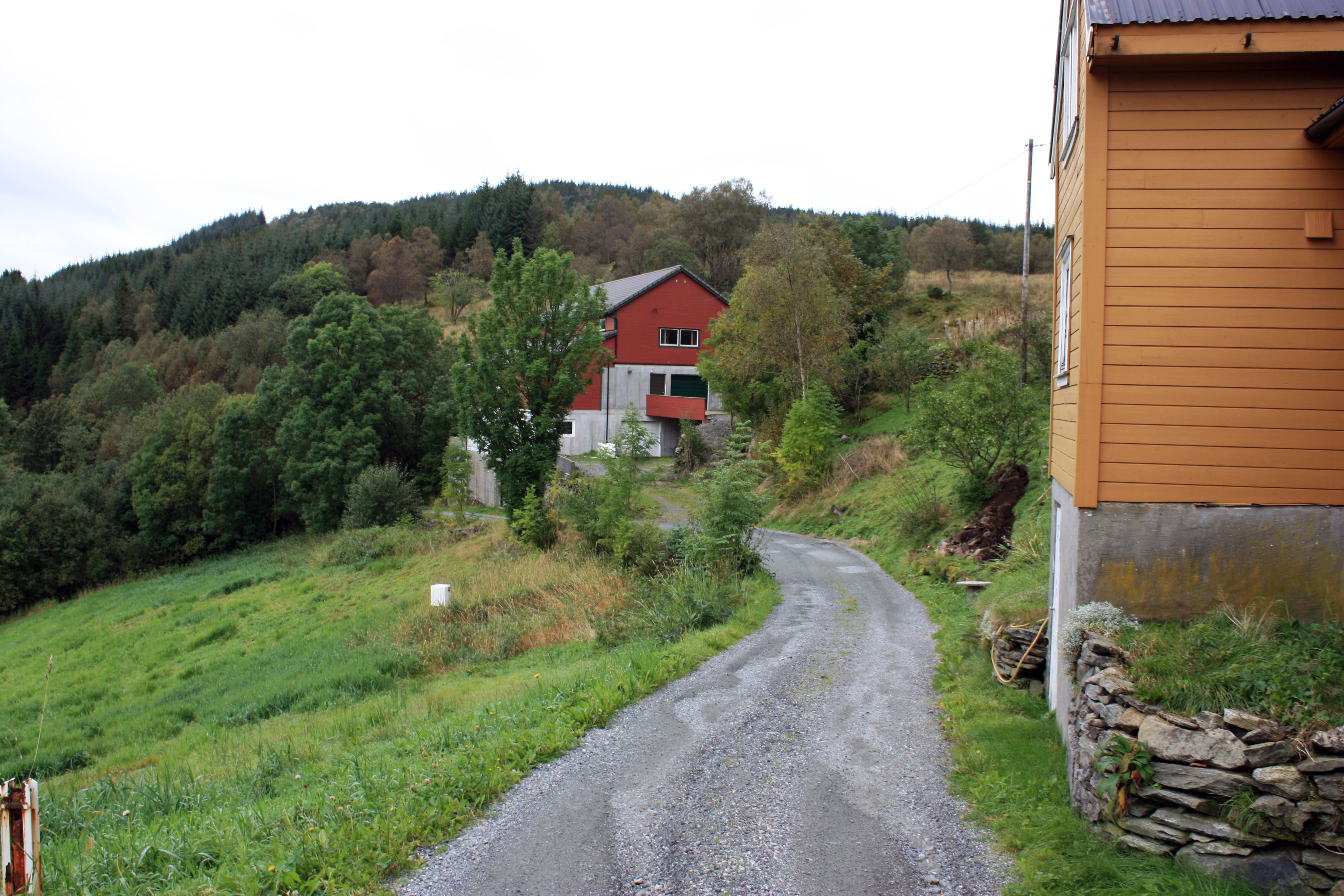 Hednevegen, Fana, Bergen.